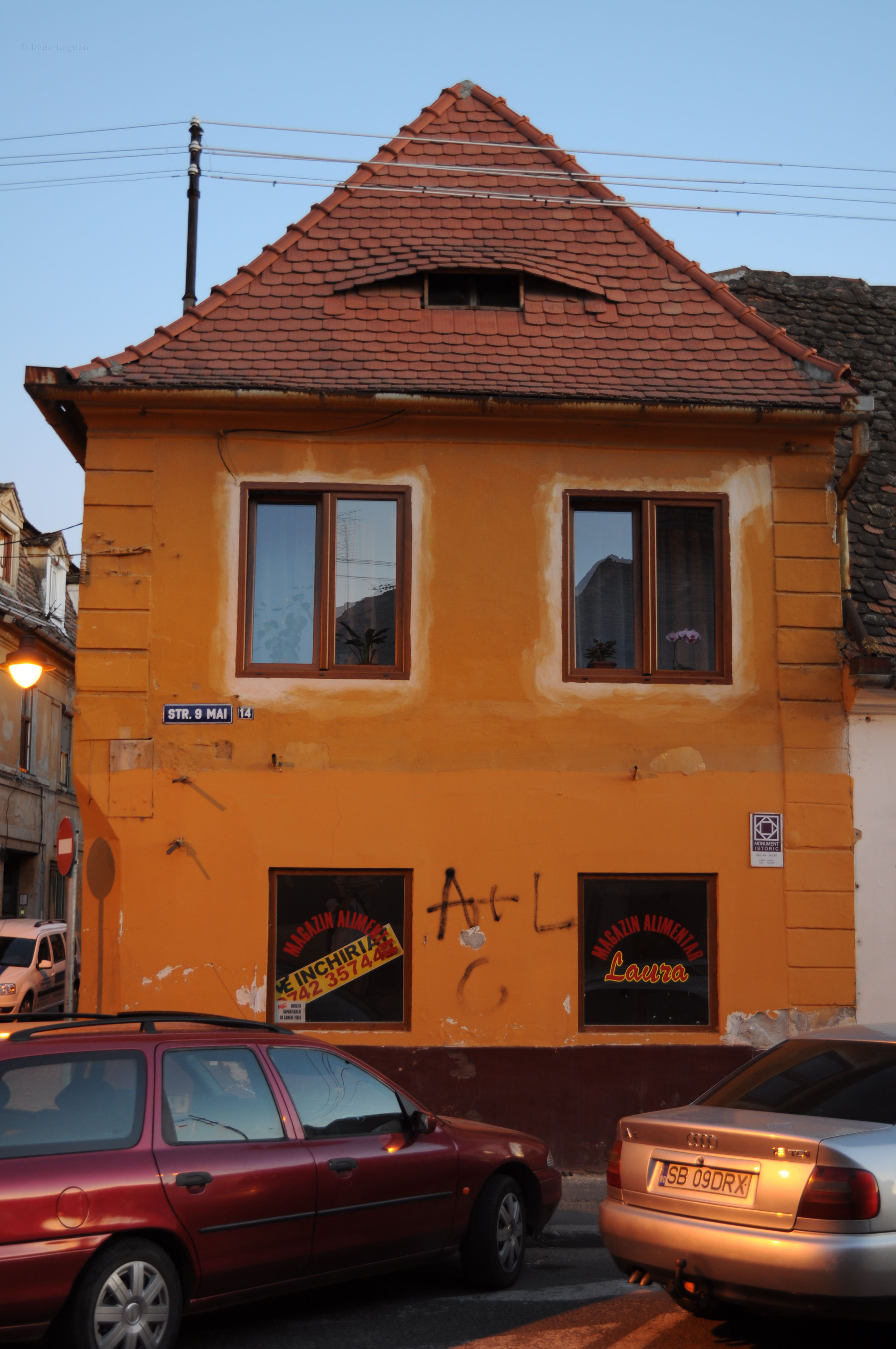 Vedere frontala - Casa Str. 9 Mai 14, Sibiu